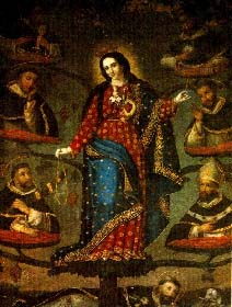 "Virgen de la Escalera". óleo sobre muro de fray Pedro Bedón que se encuentra en el convento de Santo Domingo, Quito.